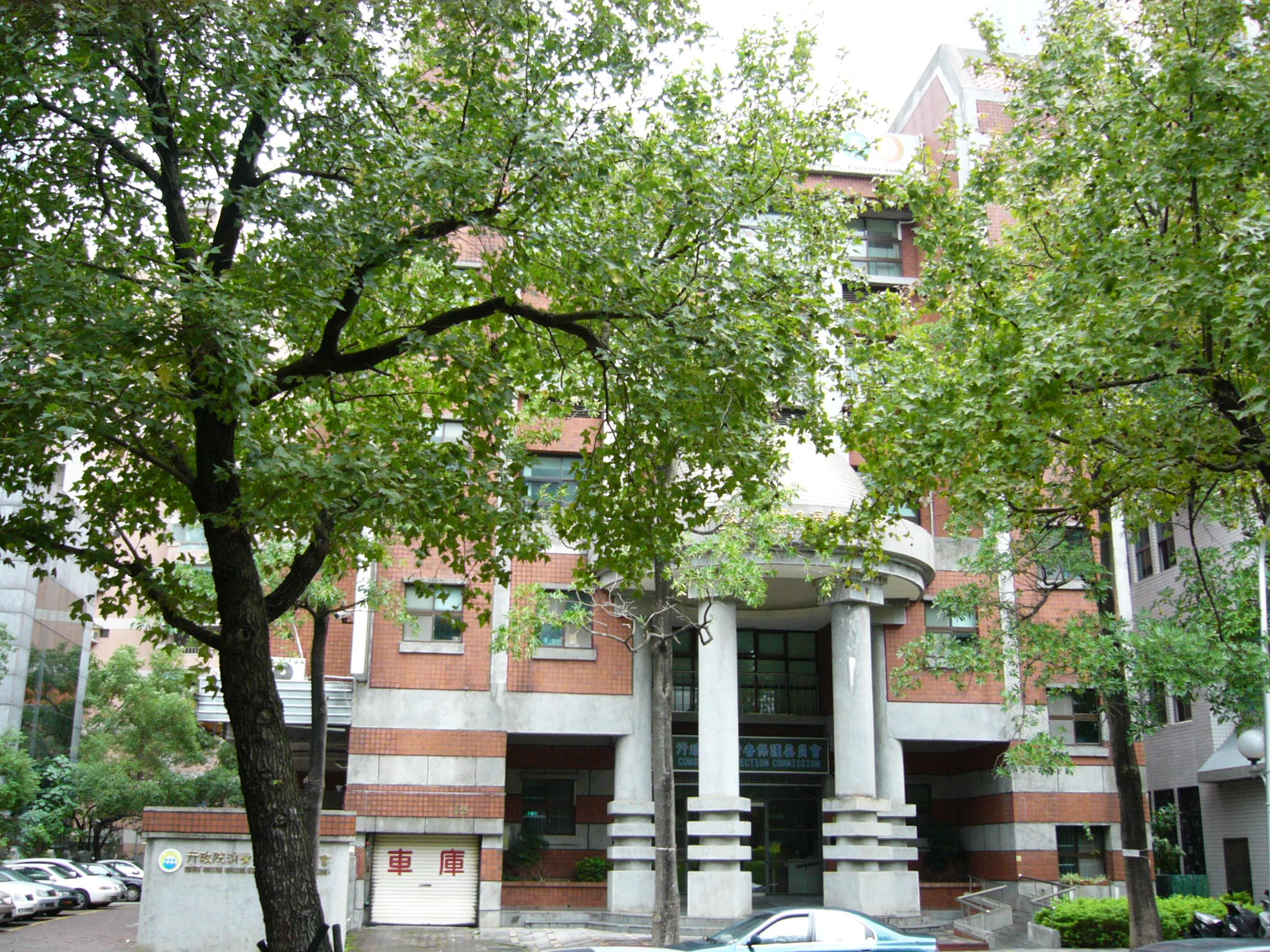 中華民國行政院消費者保護委員會曾經使用的行政院基河大樓，位於臺北市士林區基河路12號。